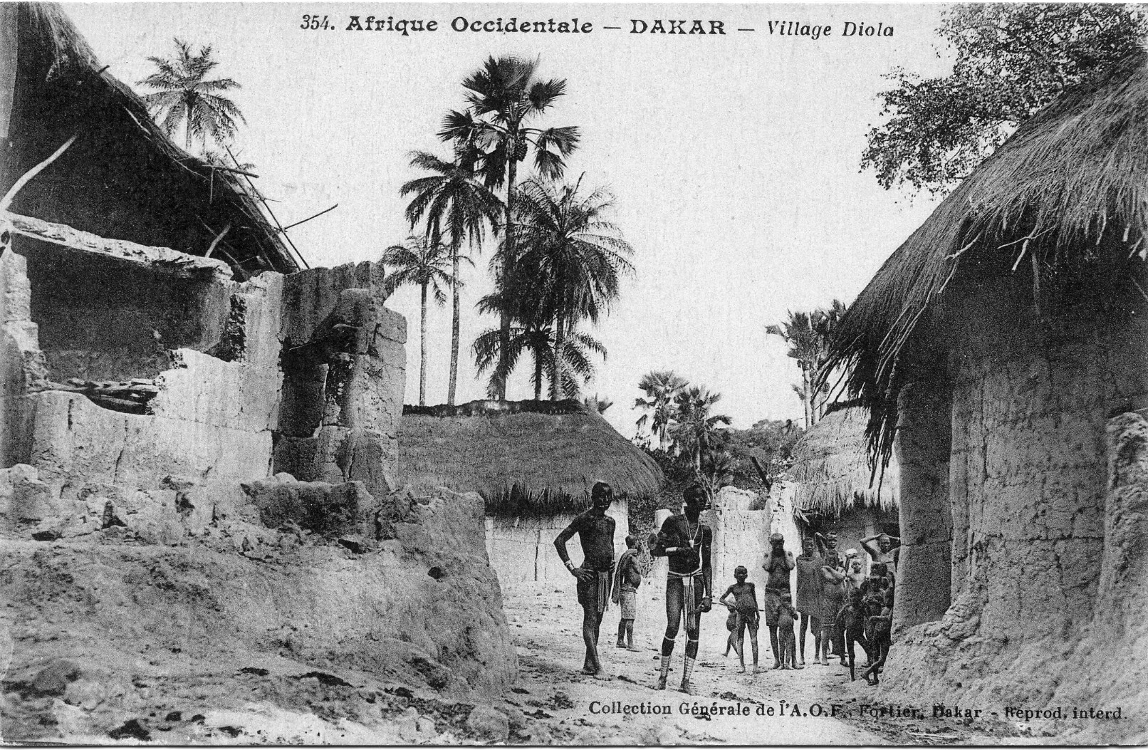 "Afrique Occidentale - Village Diola"